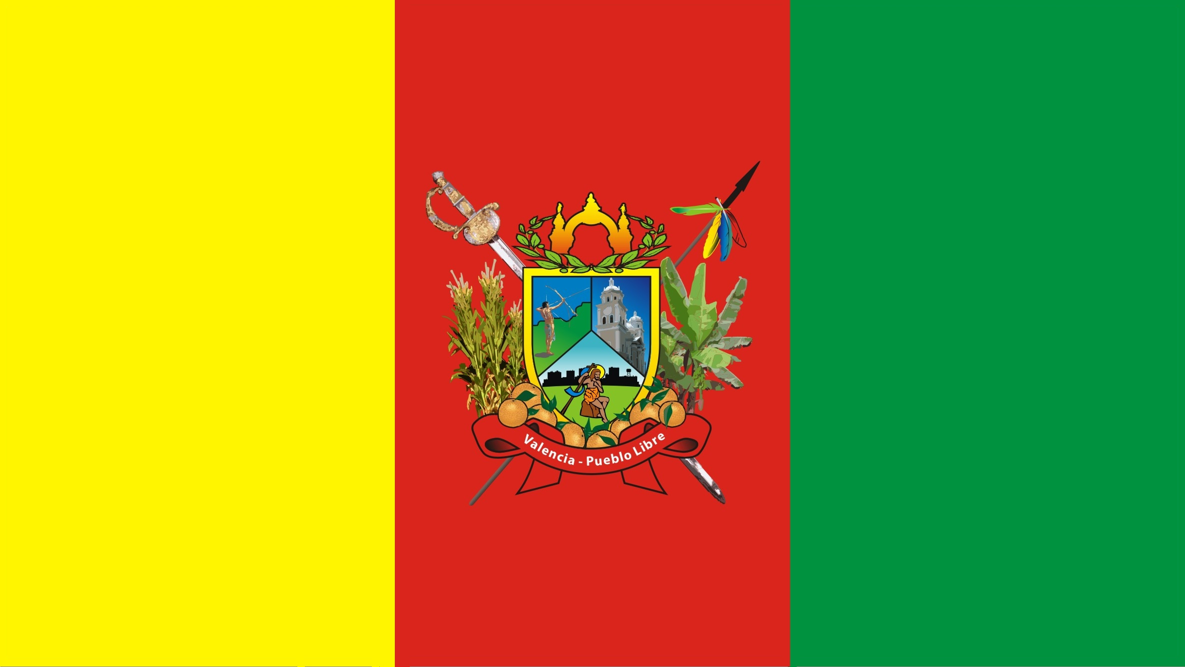 Nueva Bandera de la Alcaldía Bolivariana de Valencia, Estado Carabobo - República Bolivariana de Venezuela